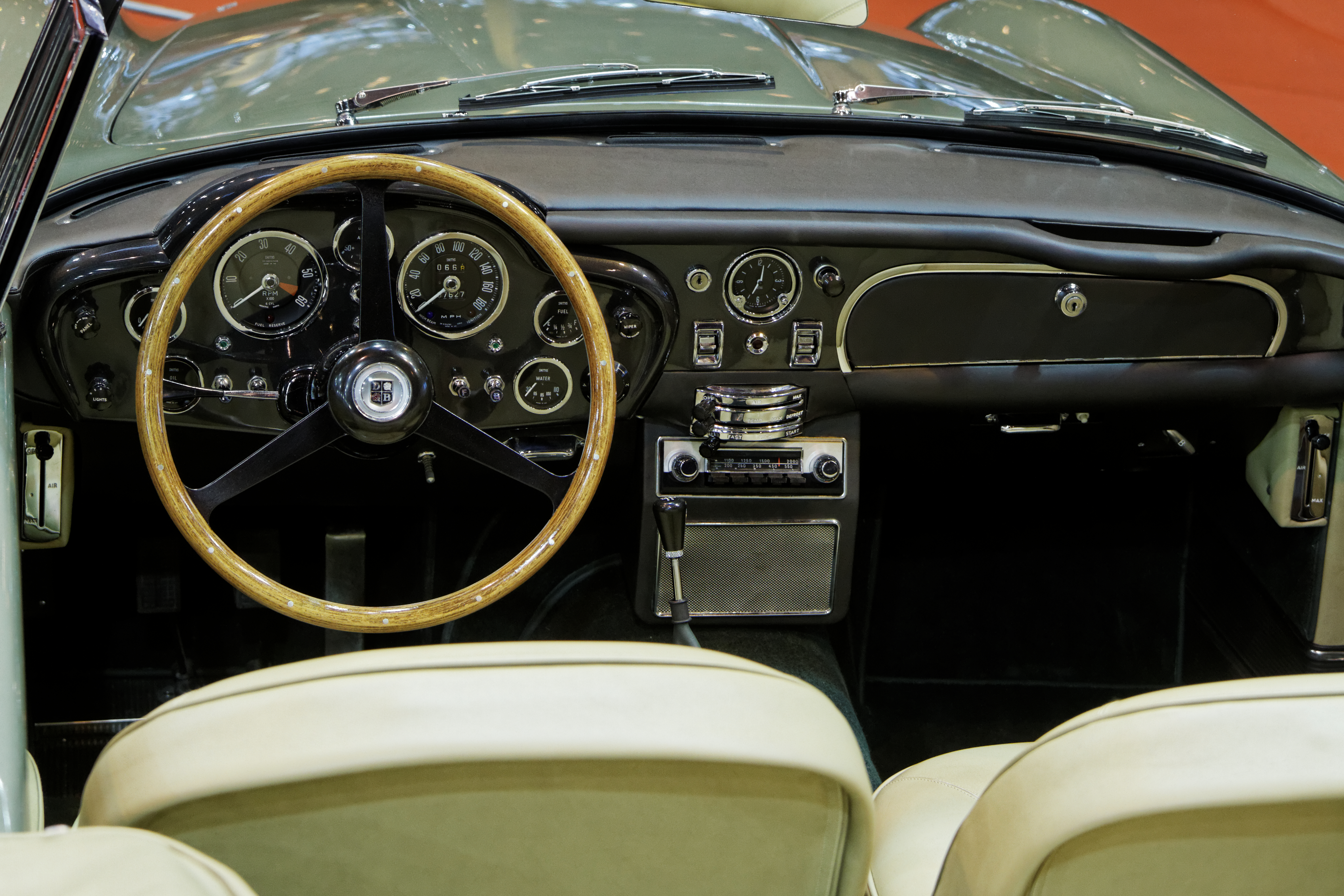 Une Aston Martin DB6 Short Chassis Volante exposée lors du salon Retromobile 2014.